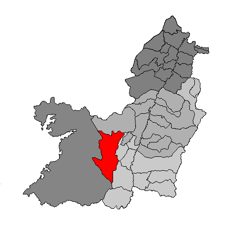 Ubicación del municipio de Dagua en el departamento del Valle del Cauca, Colombia